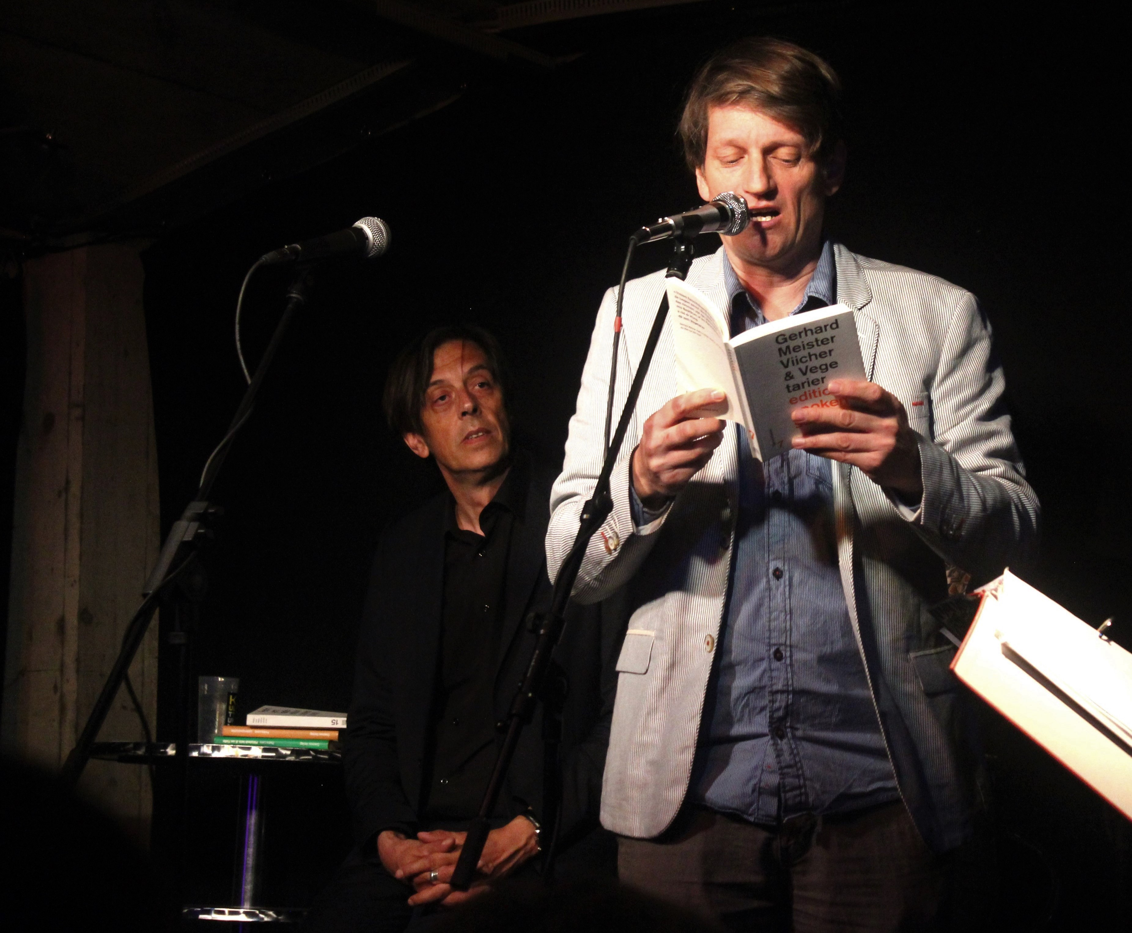 Gerhard Meister (rechts) und Pedro Lenz bei einer Lesung der Autorengruppe "Bern ist überall".